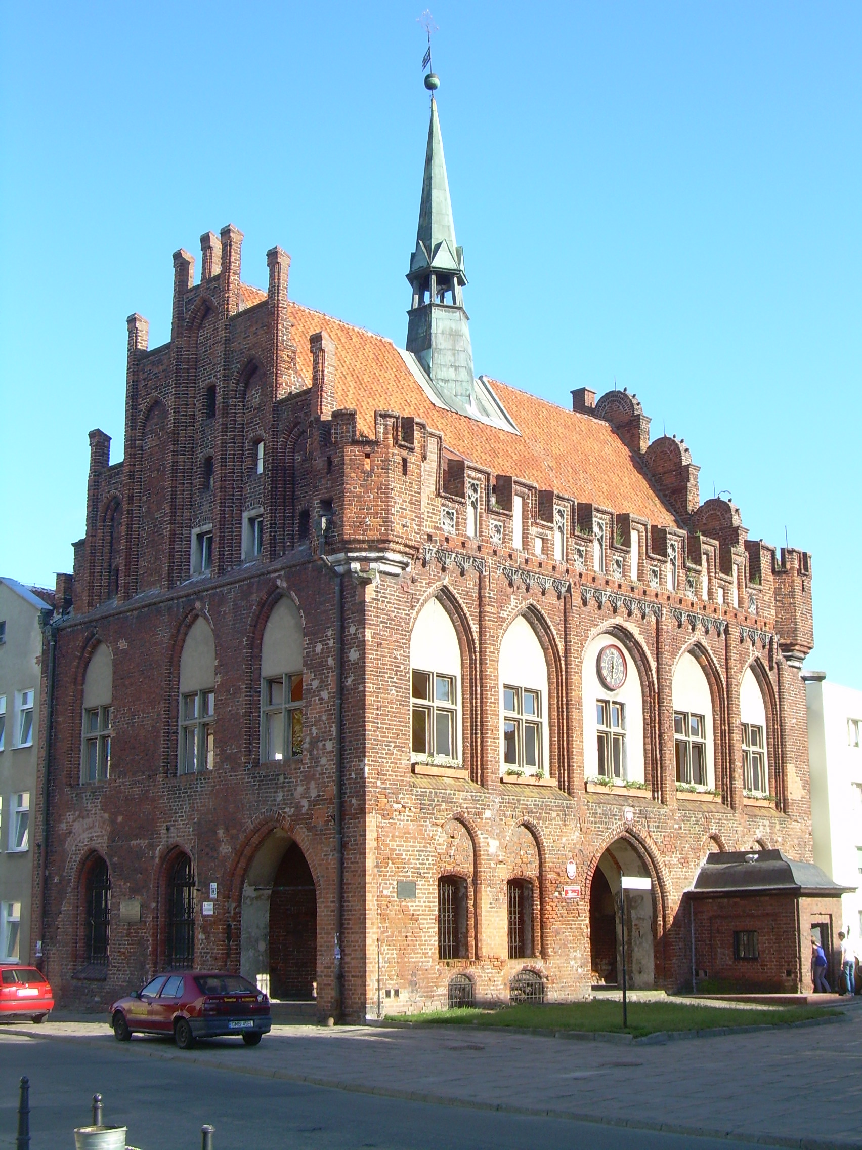 Malbork. Malbork Ratusz Staromiejski (Old Town Hall).